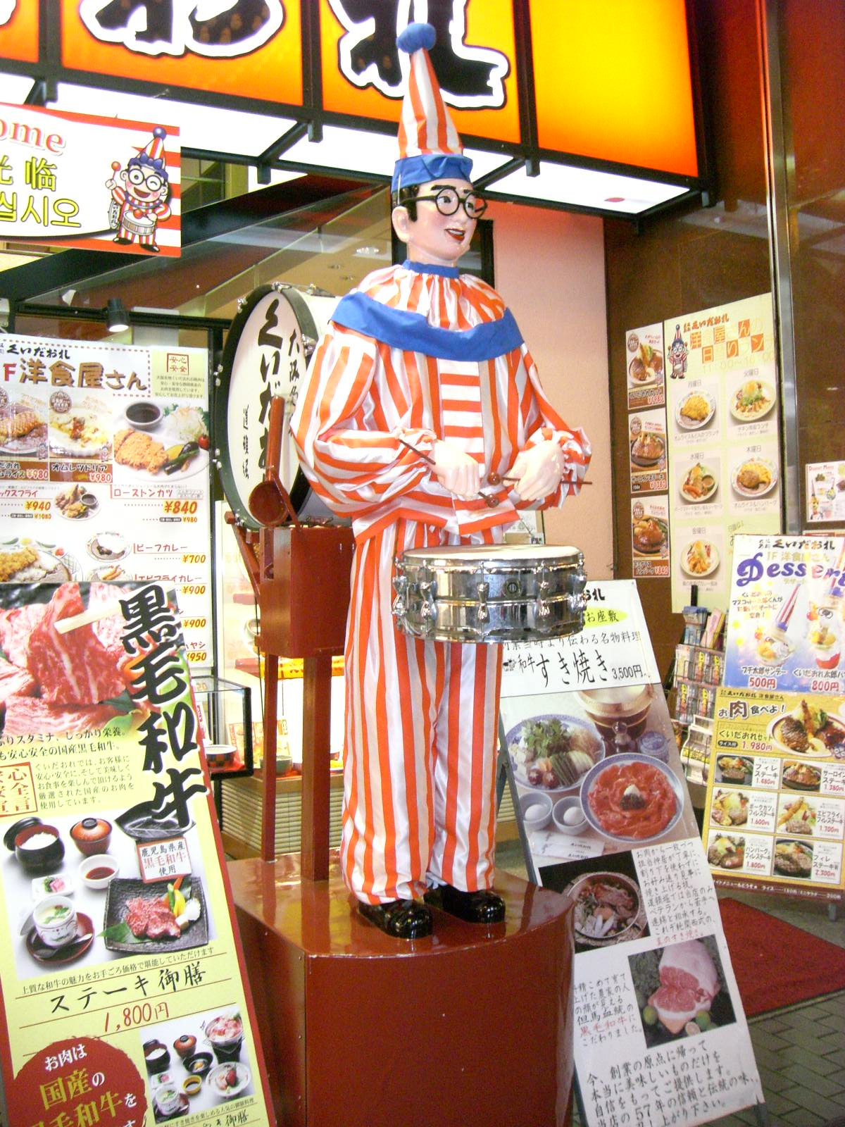 Kuidaore 2008